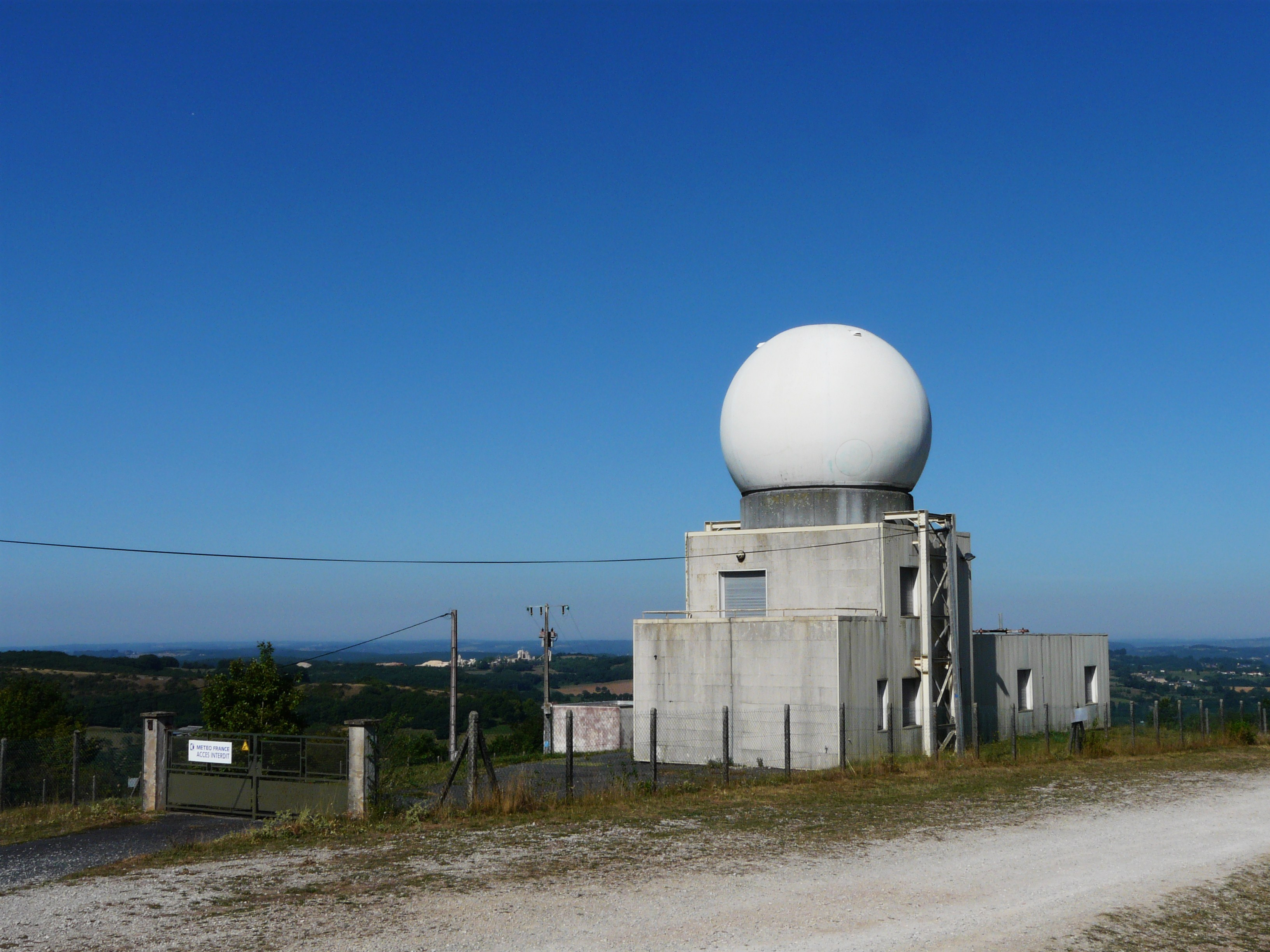 La station météorologique de Grèzes, Dordogne, France, avec le radôme d'un radar météorologique.